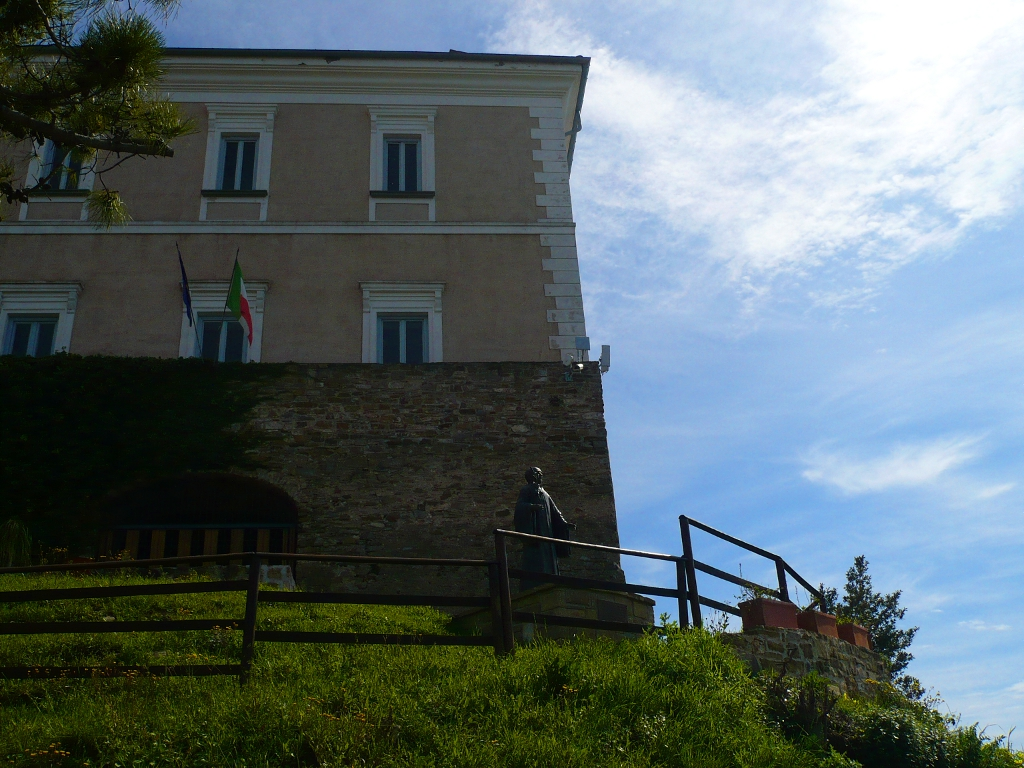 La statua di San Costabile Gentilcore nei pressi del Castello dell'abate a Castellabate